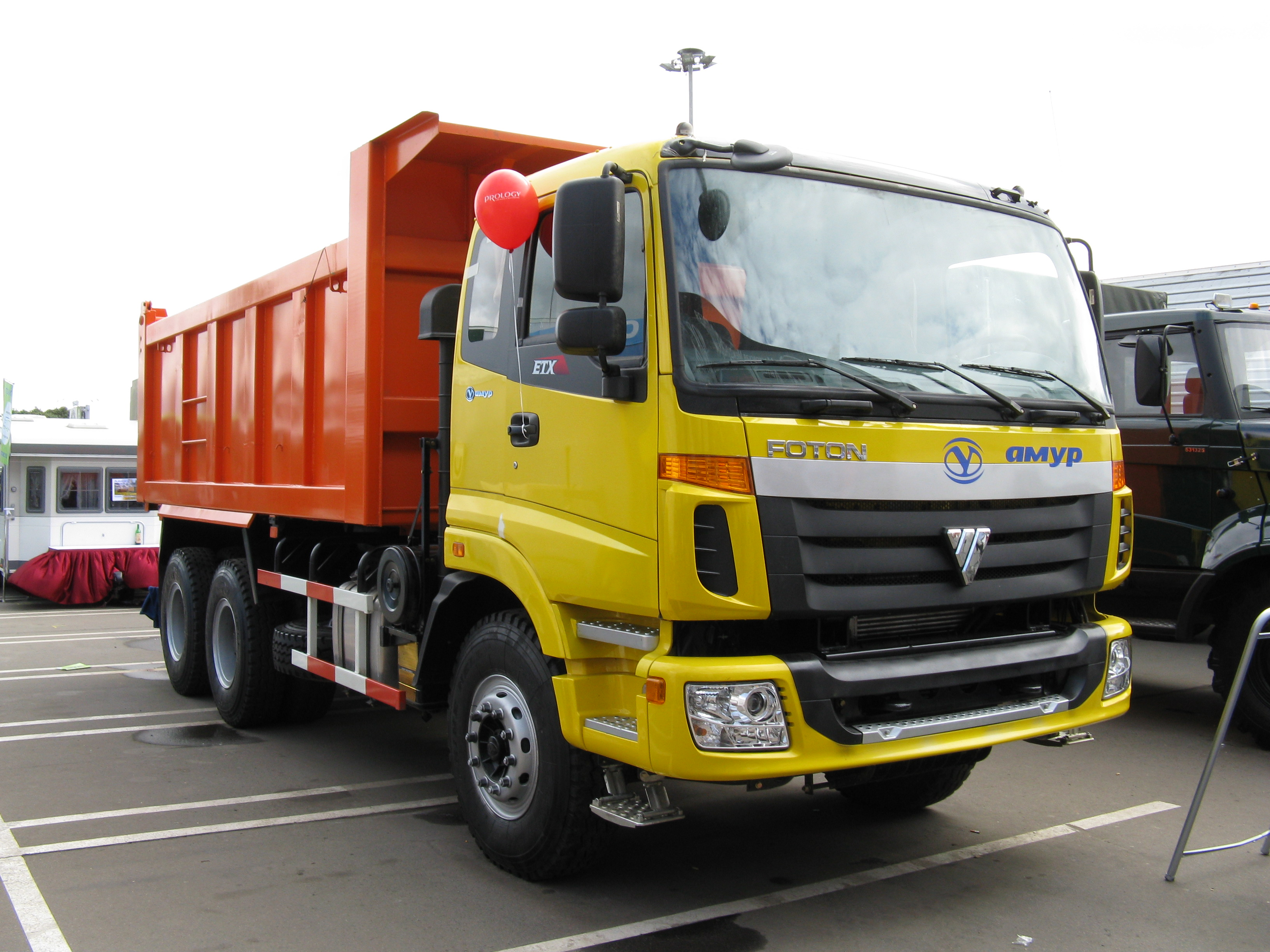 Самосвал АМУР-633201, показанный на ММАС-2008. Это китайский самосвал "Фотон".